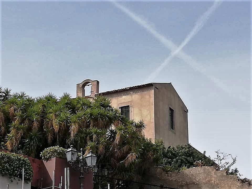 Chiesa di Santa Maria dell'Itria e convento dei Cappuccini.